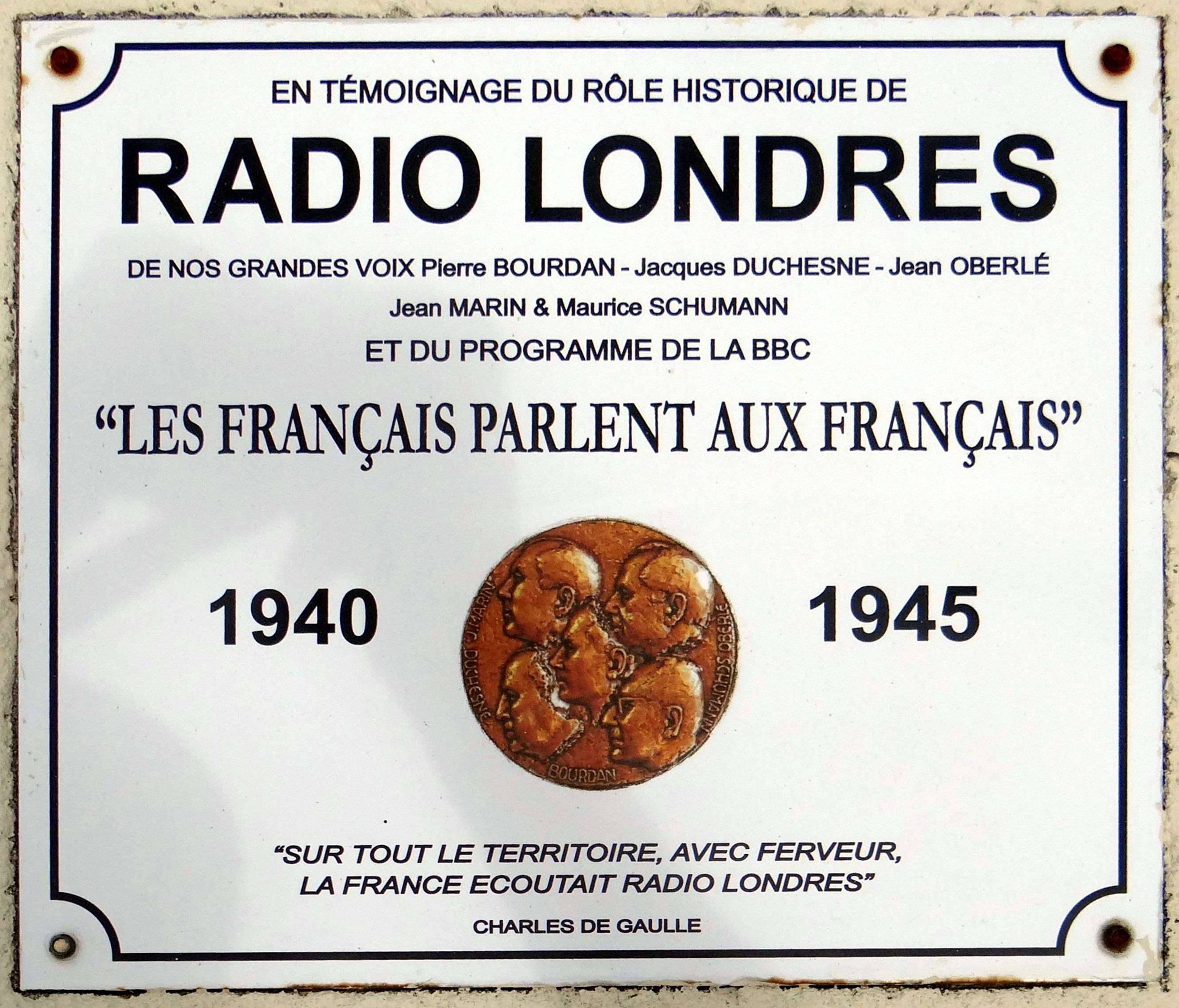 Plaque commémorative de "Radio Londes", cimetière de Asnelles, Calvados, France.